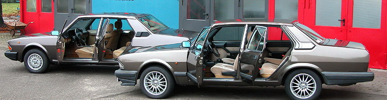 Alfa 6 1.& 2.model